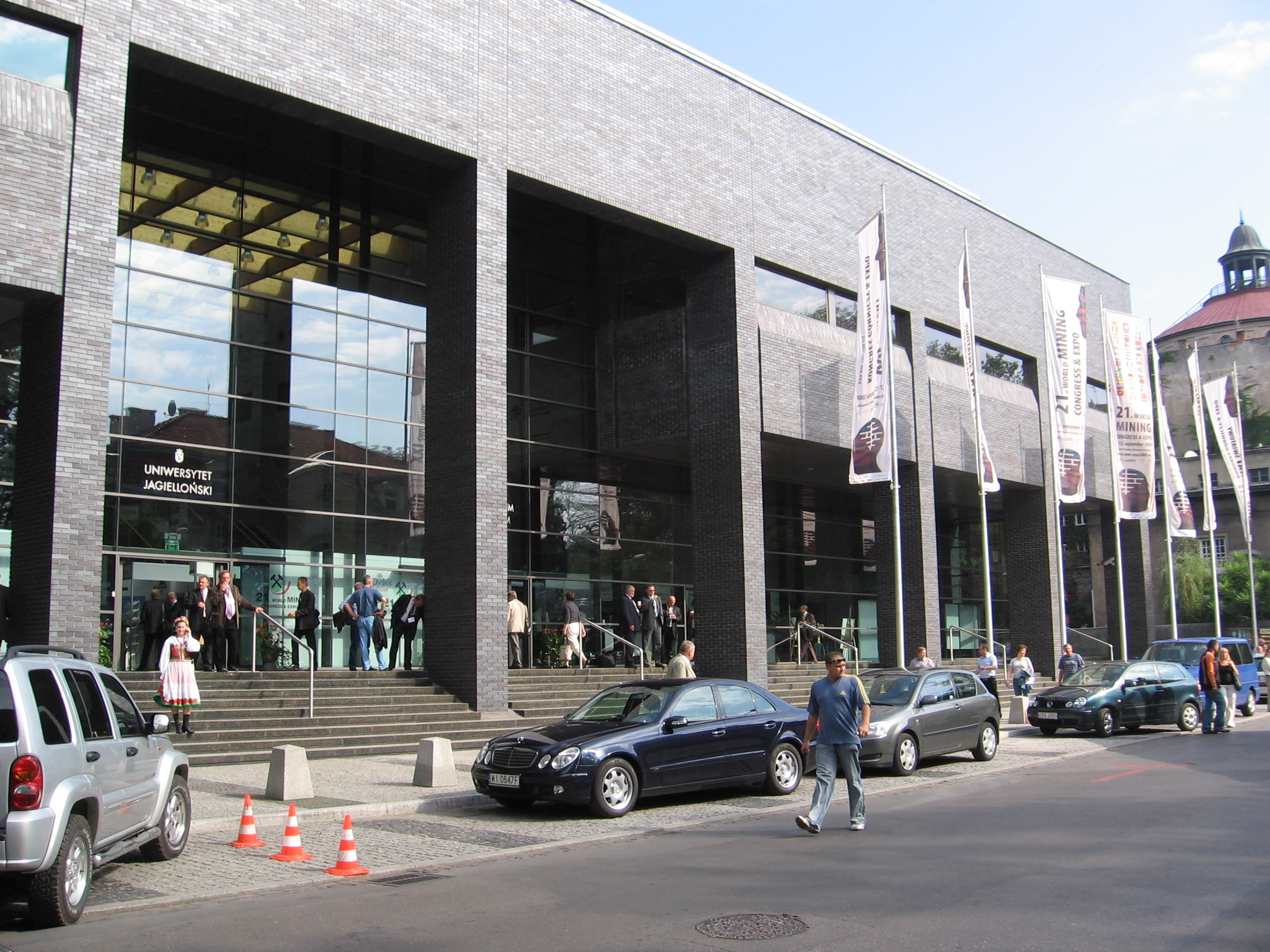 Фото